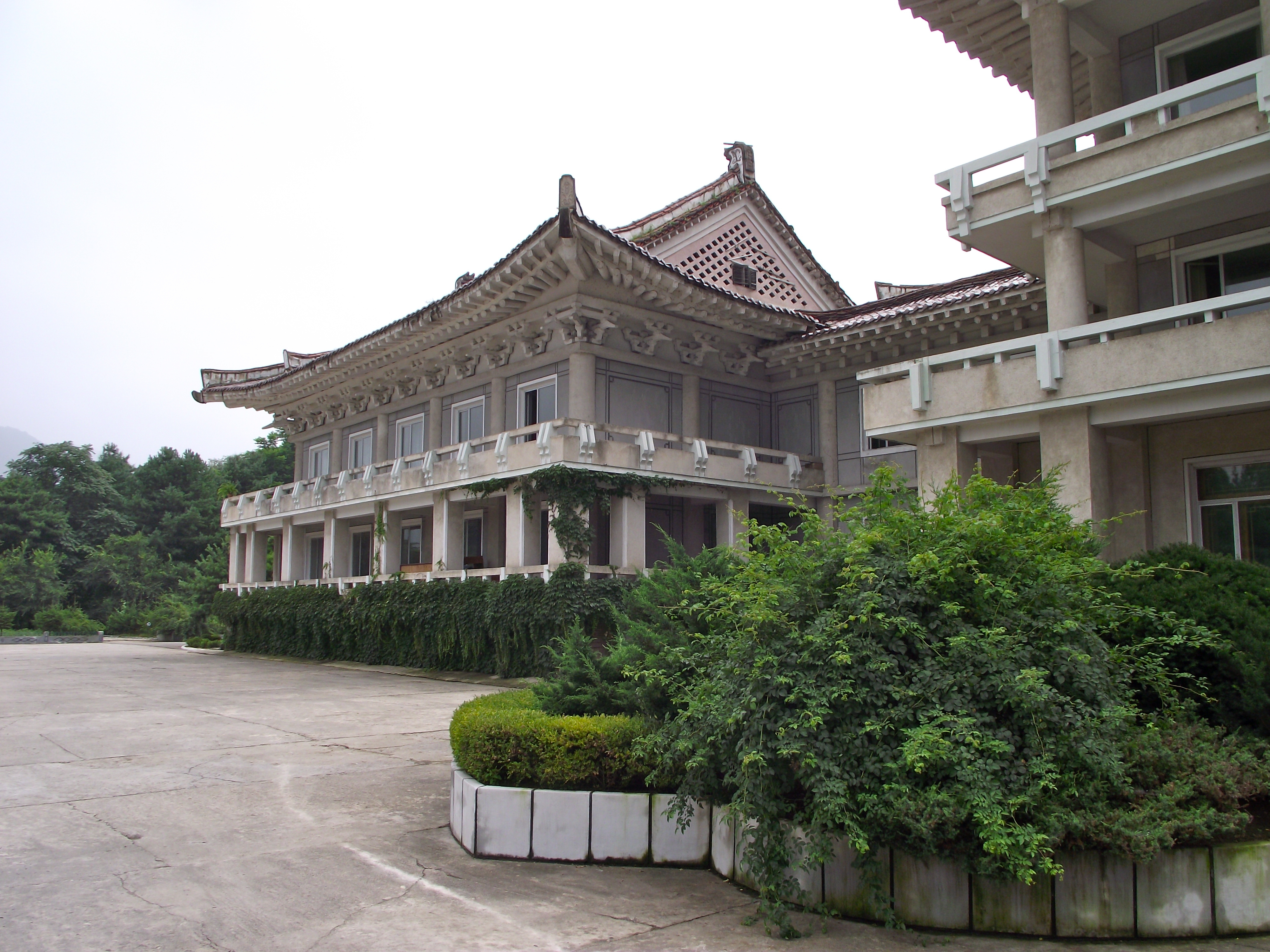 Chongchon Hotel, Hyangsan-up